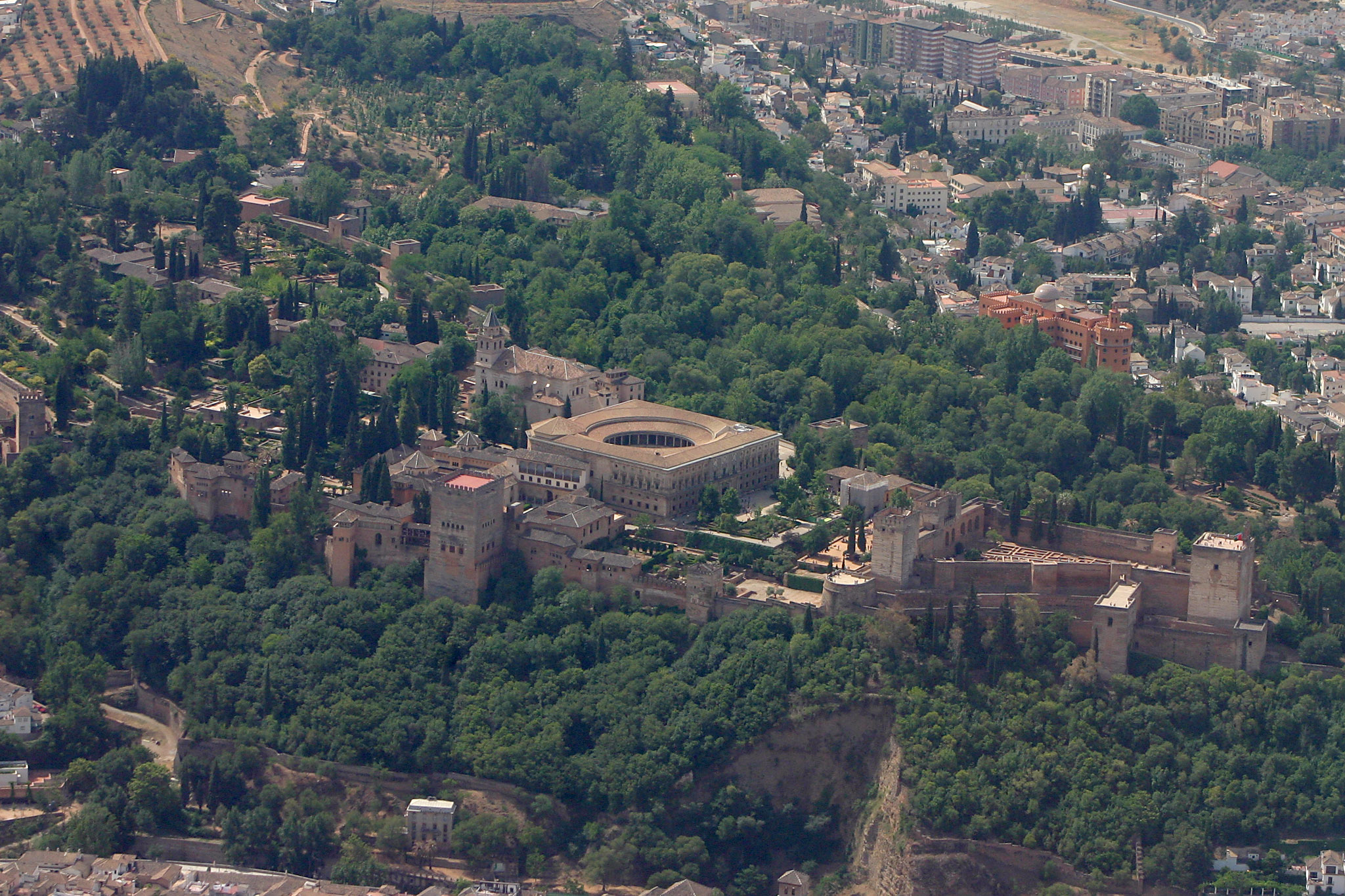 Alhambra, Spain